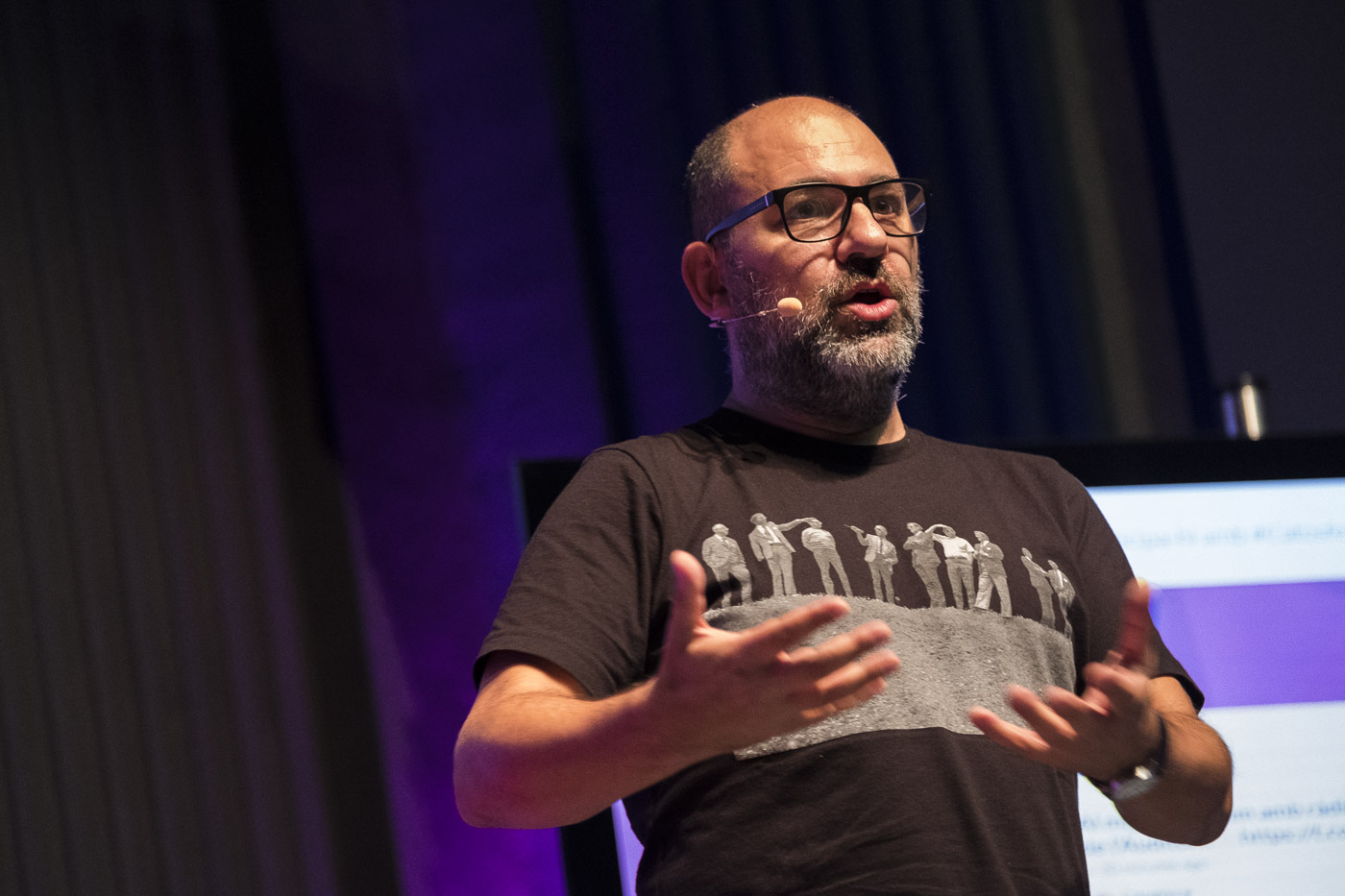 Catosfera 20 d'octubre 2017